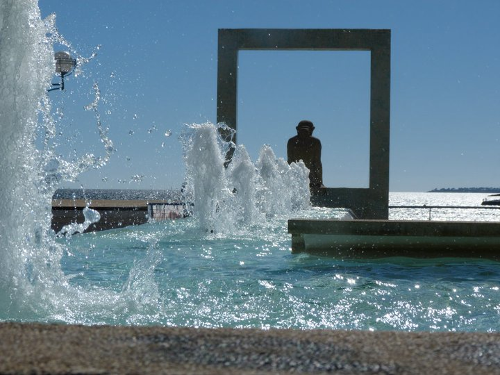 Fontaine située sur la promenade du soleil.